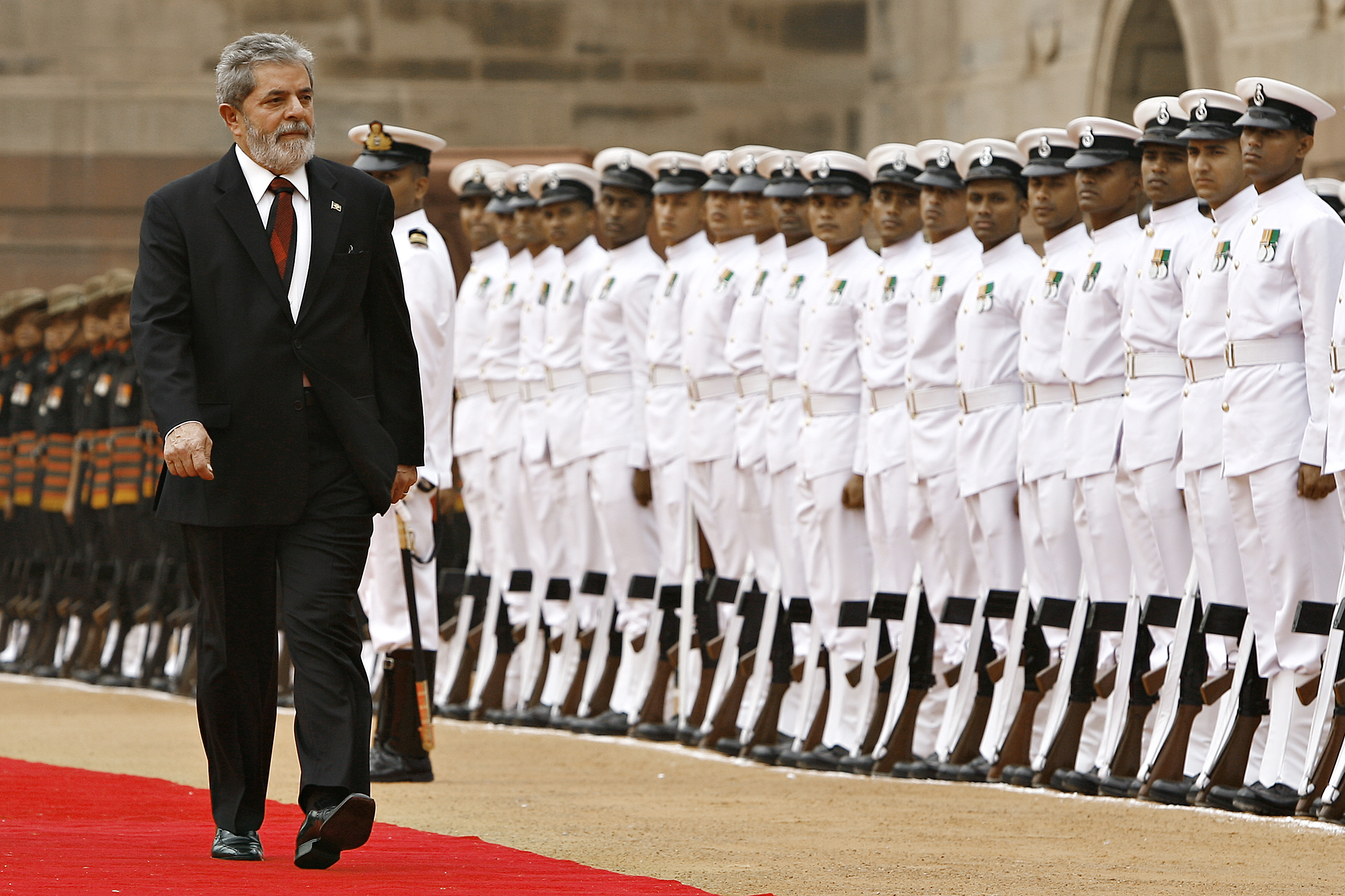 Nova Delhi (Índia) - O presidente Lula passa em revista tropas indianas, na cerimônia oficial de chegada Foto: Ricardo Stuckert/PR